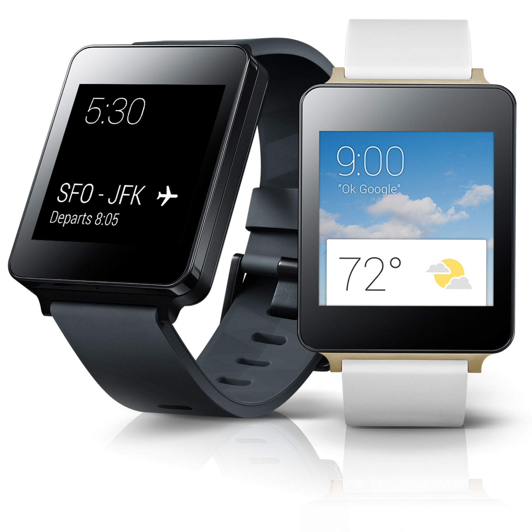 ■ 구글 ‘안드로이드 웨어’ 적용한 첫 스마트워치 ‘LG G워치’ 공개 ■ 안드로이드 기반 스마트폰과 호환되는 뛰어난 연결성 ■ 직관적이고 편리한 UX, 미니멀한 디자인도 강점 ■ 최적화된 하드웨어 탑재 □ 1.65인치 IPS 디스플레이, 1.2GHz 퀄컴 스냅드래곤 400 프로세서, 400mAh 대용량 배터리 등 ■ 사용자 편의성 혁신 □ 음성 인식 기반 ‘구글 나우’, 화면이 꺼지지 않는 ‘올웨이즈 온’, 방수 및 방진 기능, 교체 가능한 스트랩 등 ※ Social LG전자 ( 에서 관련 보도자료를 확인하실 수 있습니다.